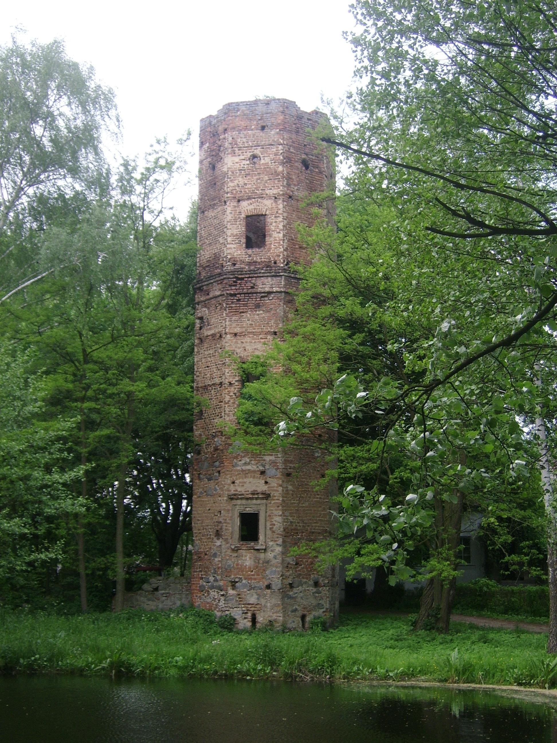 Baszta ruin zamku w Wyszynie